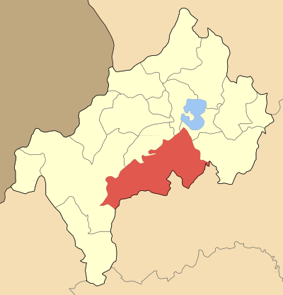 Дем Орестида на картата на Ном Костур, Гърция Locator map of Orestidos municipality (Δήμος Ορεστίδος) at Kastoria perfecture, Greece).